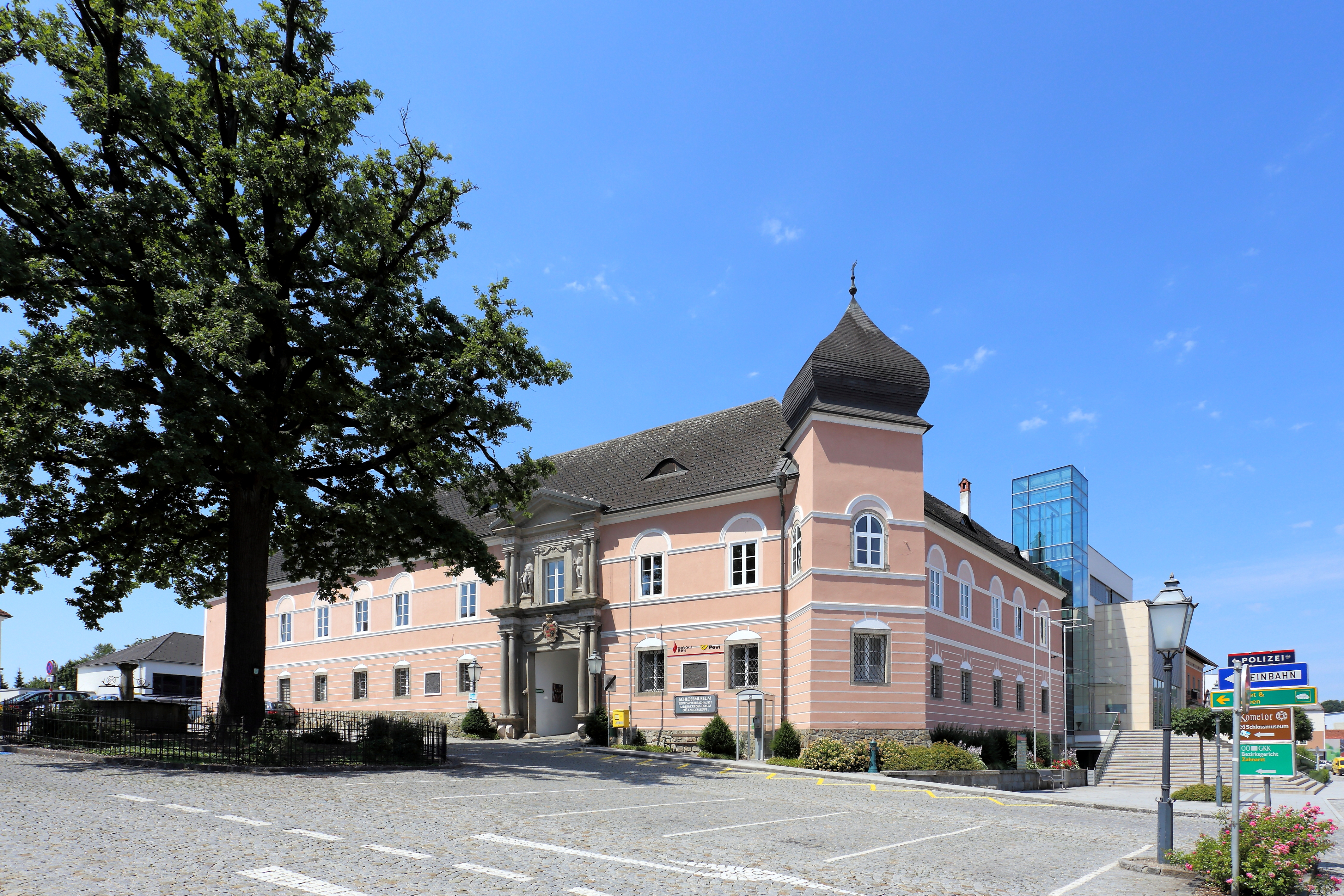 Ehemaliges Schloss in der oberösterreichischen Stadt Peuerbach. 1571 abgebrannt und wieder errichtet. 1830 wurde es umgebaut. Bemerkenswert ist das zweigeschossige Renaissance-Portal mit zwei Ritterstatuen und einer Wappenkartusche aus dem dritten Viertel des 17. Jahrhunderts.